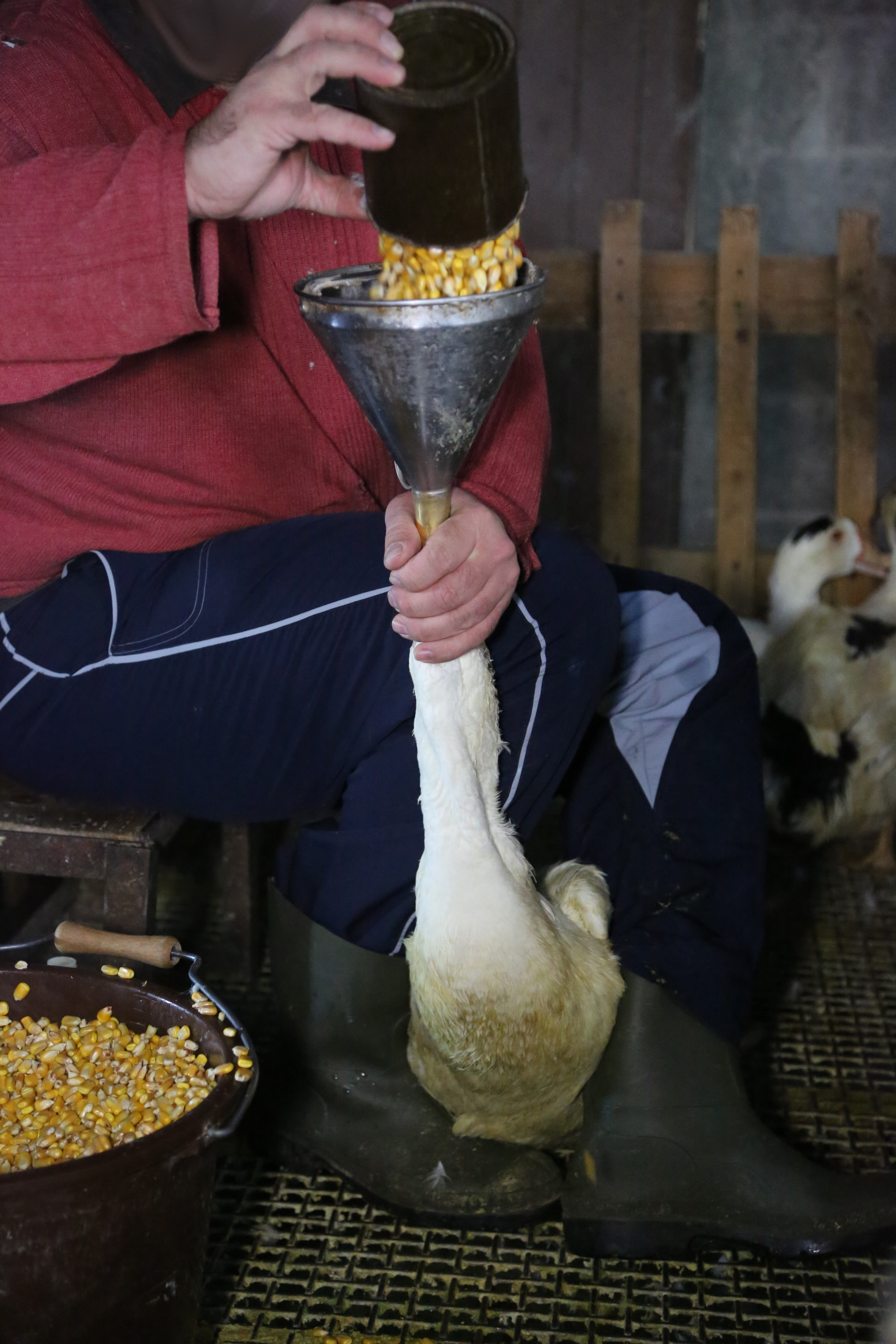 Gavage des canards en parc, enquète de l'association L214, France 2012